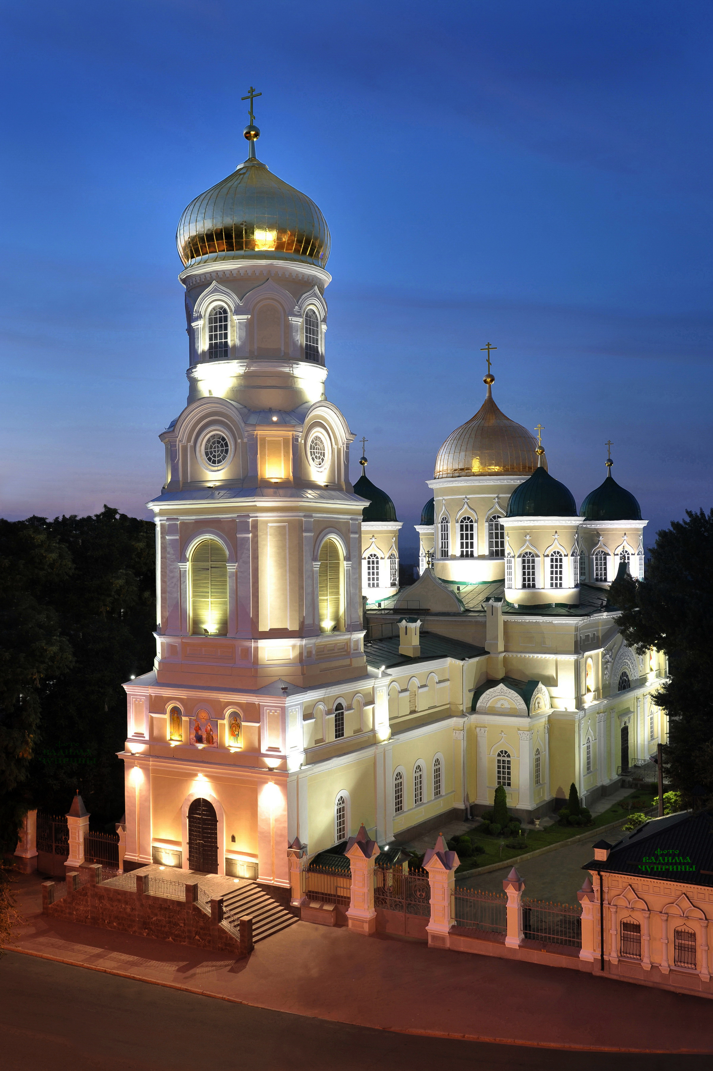 Свято-Троицкий собор (Днепр) ночью, фото Чуприна Вадим.